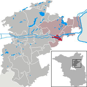 Niederfinow in Brandenburg (Country) - District Barnim